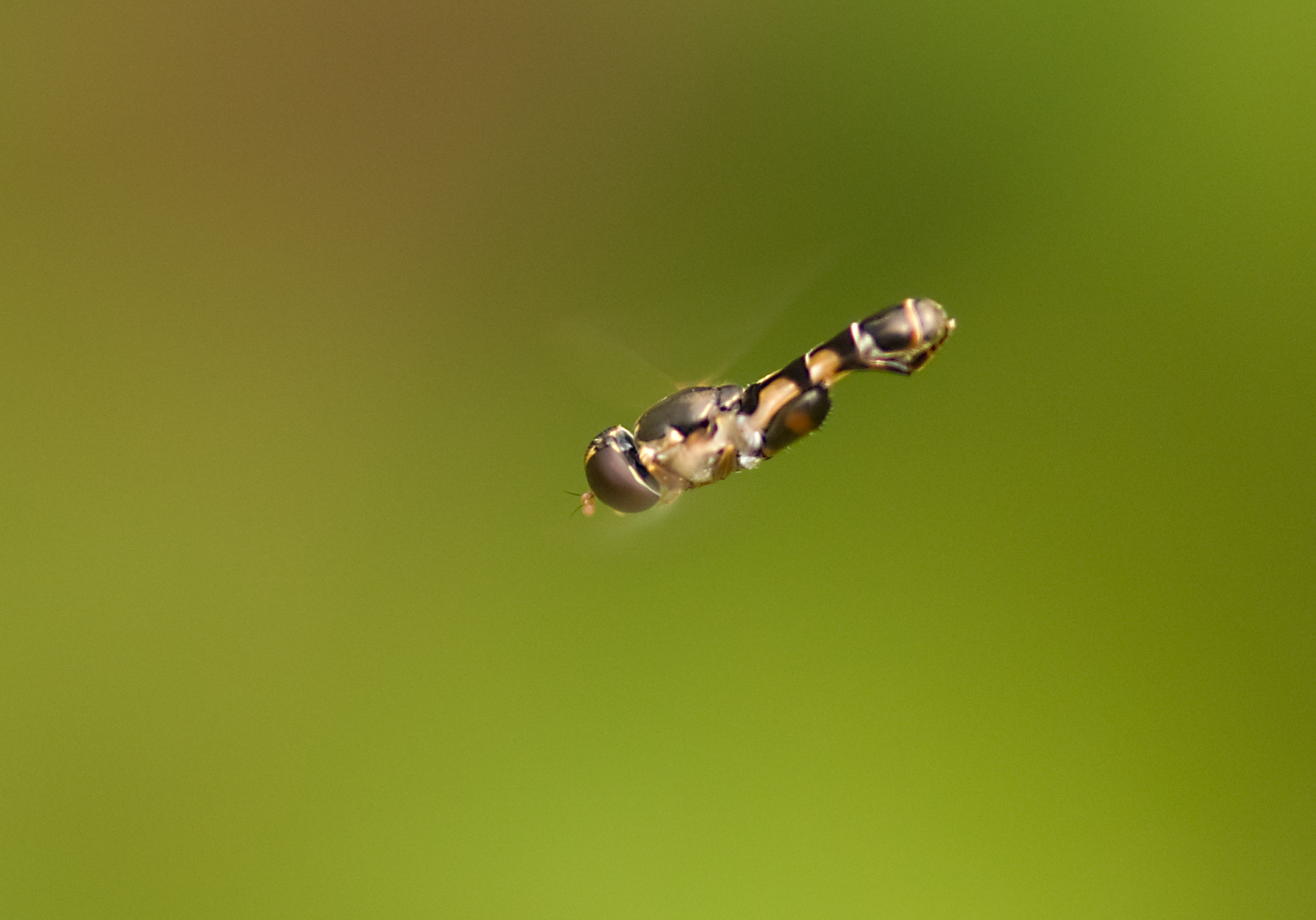 Syritta pipiens